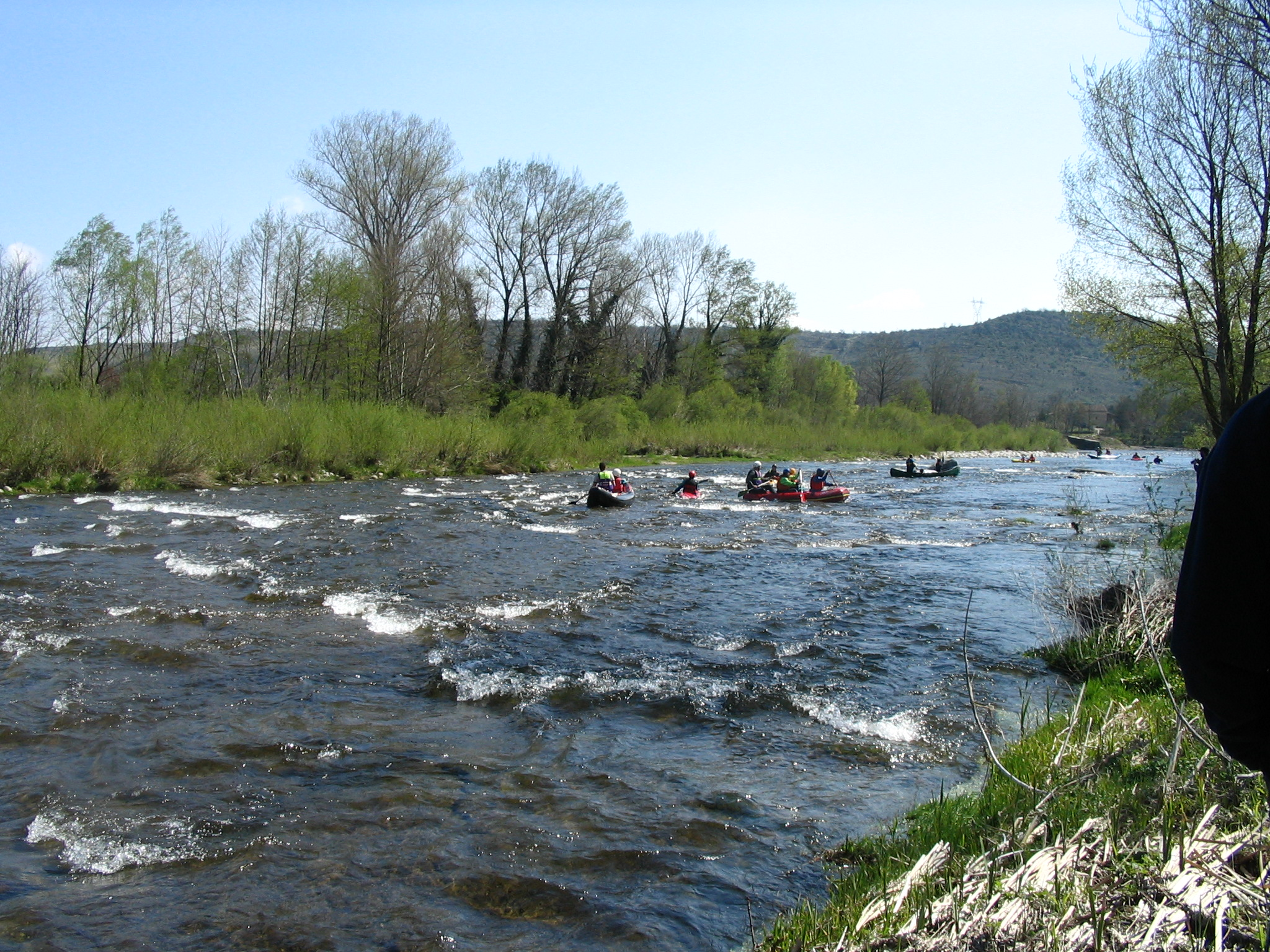 Beaume, Beginn der Durchbruchstrecke bei Rosières.